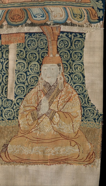 Монгол: Бабуша хатан